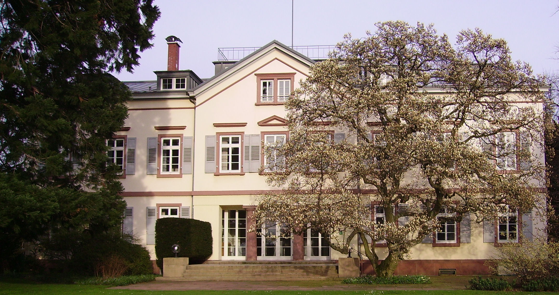 garden in Weinheim, Germany